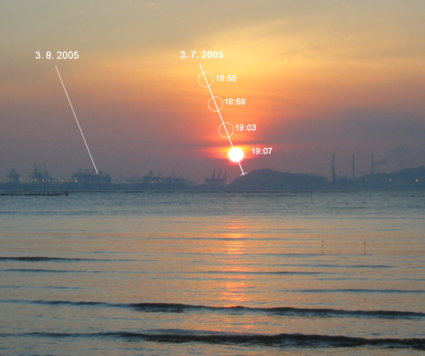 L'image montre un coucher du soleil à Hong-Kong (3 juillet) et un calcul du cours solaire dans les intervalles de 4 minutes. À gauche le cours de soleil 1 mois plus tard (3 août); au Solstice (20 juin), la trace se passe à droite autour de 1 diamètre solaire.